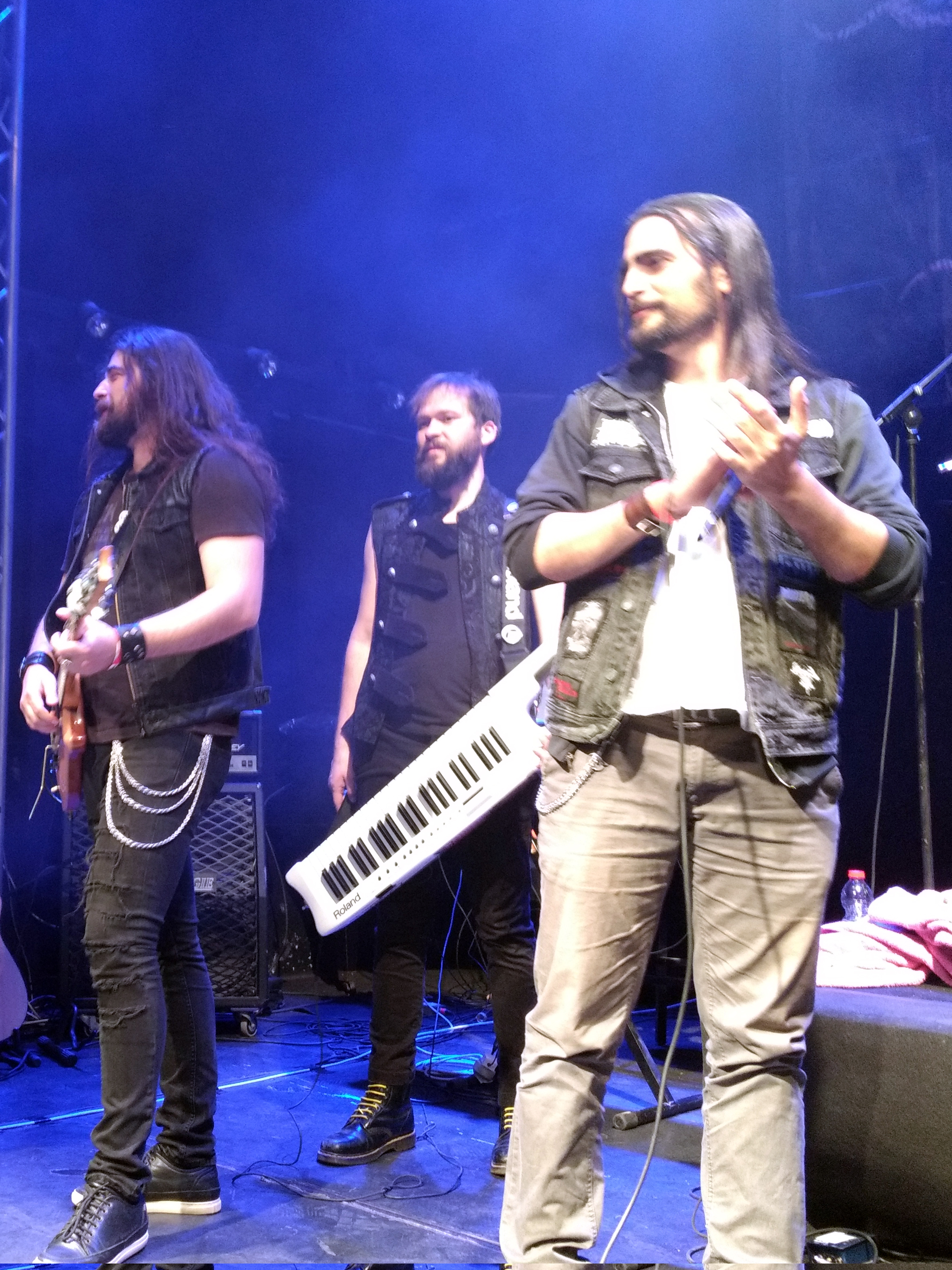 Yochai Davidoff and Desert